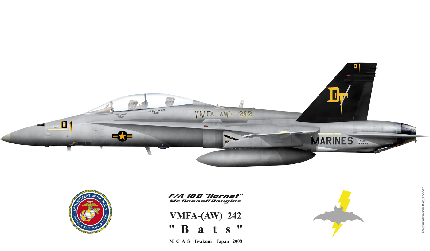 F/A-18D VMFA-242 color scheme